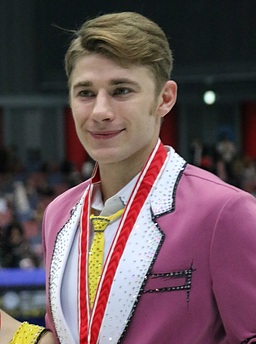 Кристина Астахова и Алексей Рогонов на NHK Trophy 2017